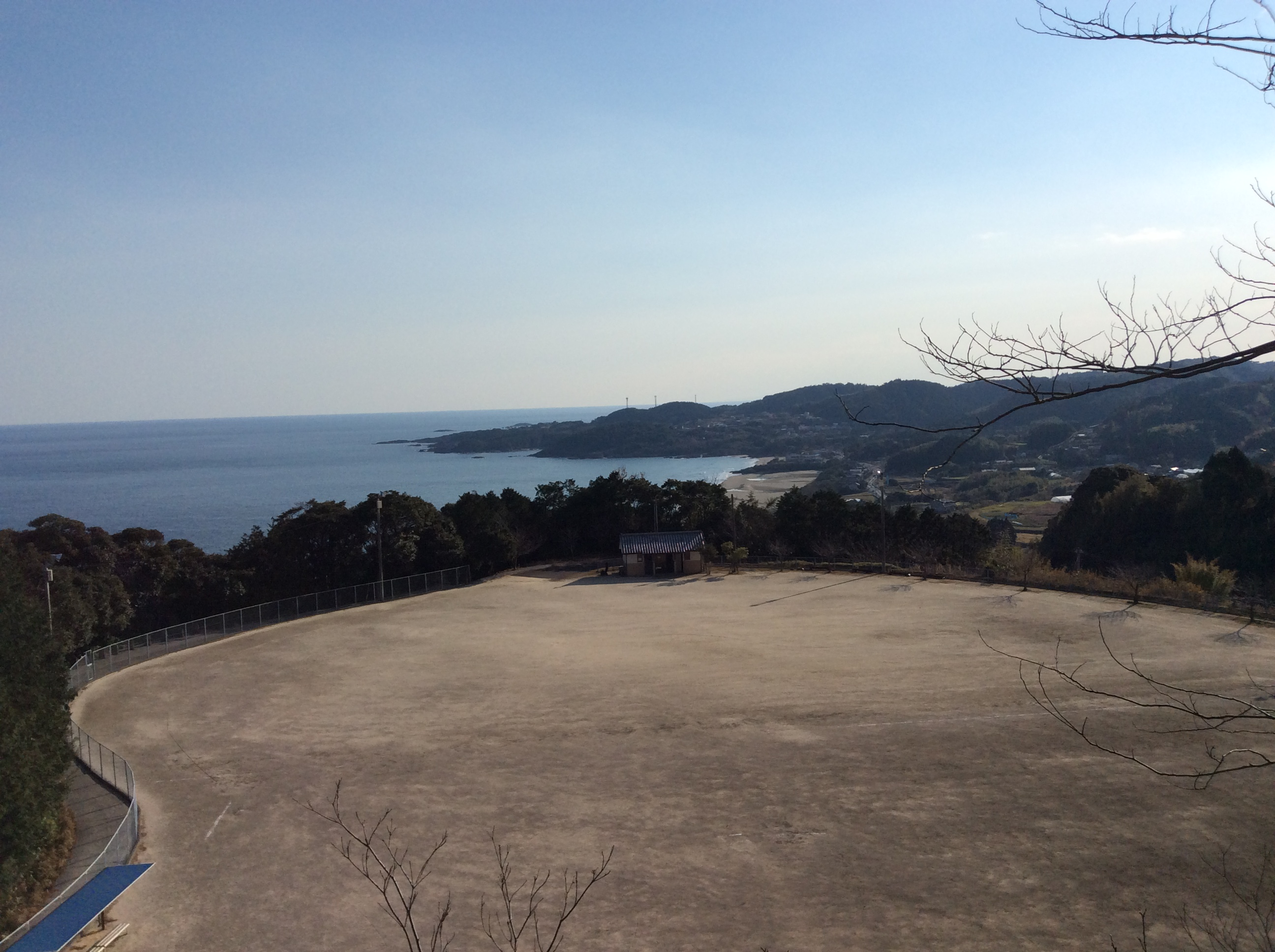 宮崎県日向市平岩にある公園（平岩農村公園）と日向灘（金ヶ浜海水浴場）。